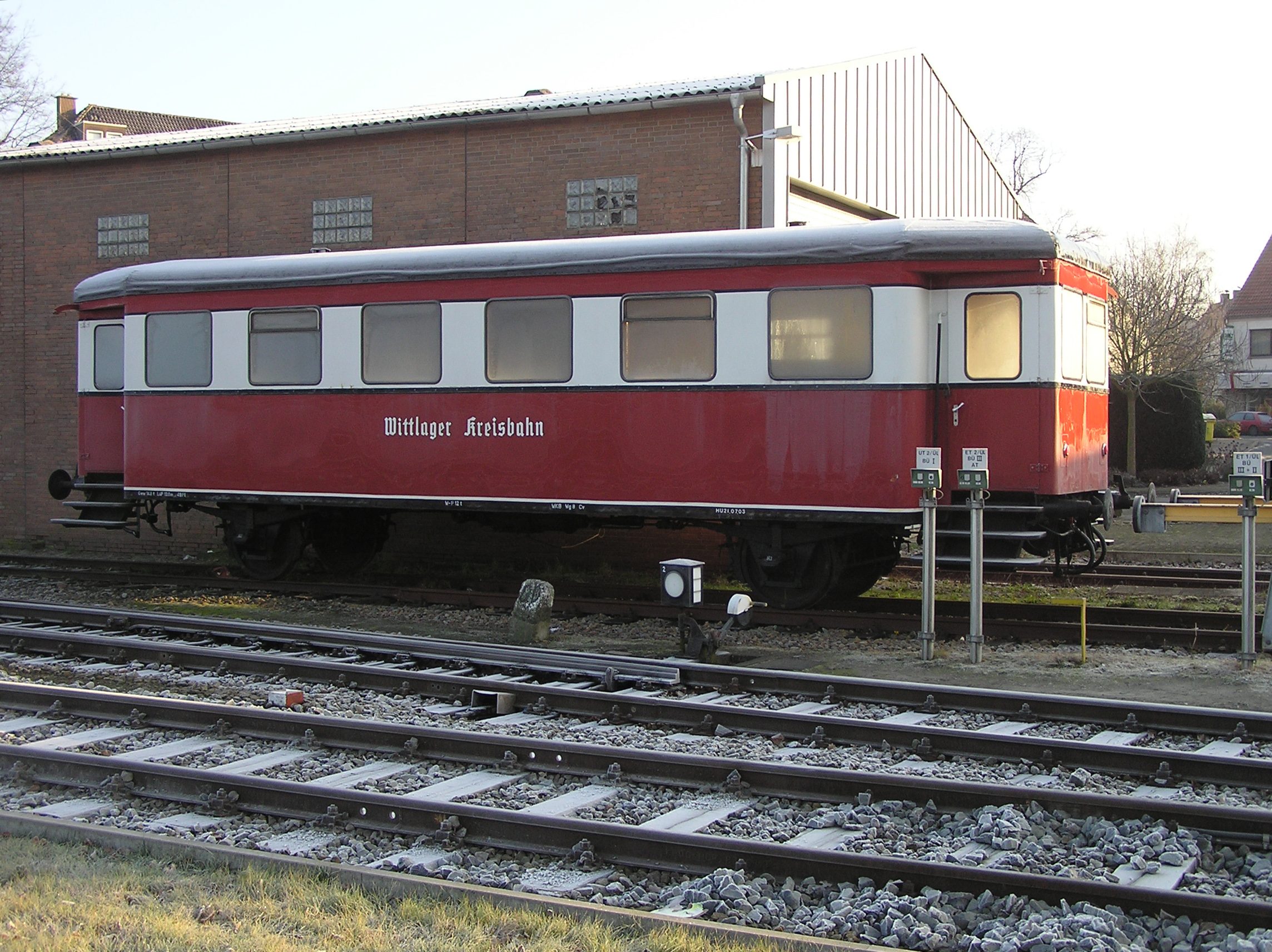 Beiwagen TA8 der Wittlager Kreisbahn im Privatbahnhof Bohmte. Wagon gebaut von Linke-Hofmann-Busch in Bautzen 1935 (A1 dm) als 135 060; 23.03.47 an Georgsmarienhütten-Eb. (GME) T1; 1949 Wittlager Kreisbahn T3; 1989 Verkehrsgesellschaft Landkreis Osnabrück T3 (als Museumsfahrzeug genutzt von der Museumseisenbahn Minden (MEM)) aus Minden, Nordrhein-Westfalen.